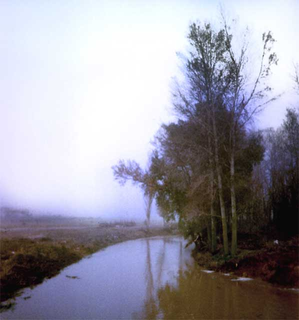 Crecida del río Guareña, afluente del Duero